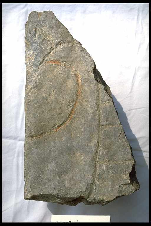 Runstensfragment (Öl25339:14 Köpingsvik). Endast ett par runor kan läsas. Spår av ursrpunglig färg. Motiv: Öl Köpingsvik kyrka (flera objekt) Nyckelord: Runor Kategori: Runristning/runsten Runstensfragment (Öl25339:14 Köpingsvik). Endast ett par runor kan läsas. Spår av ursrpunglig färg.